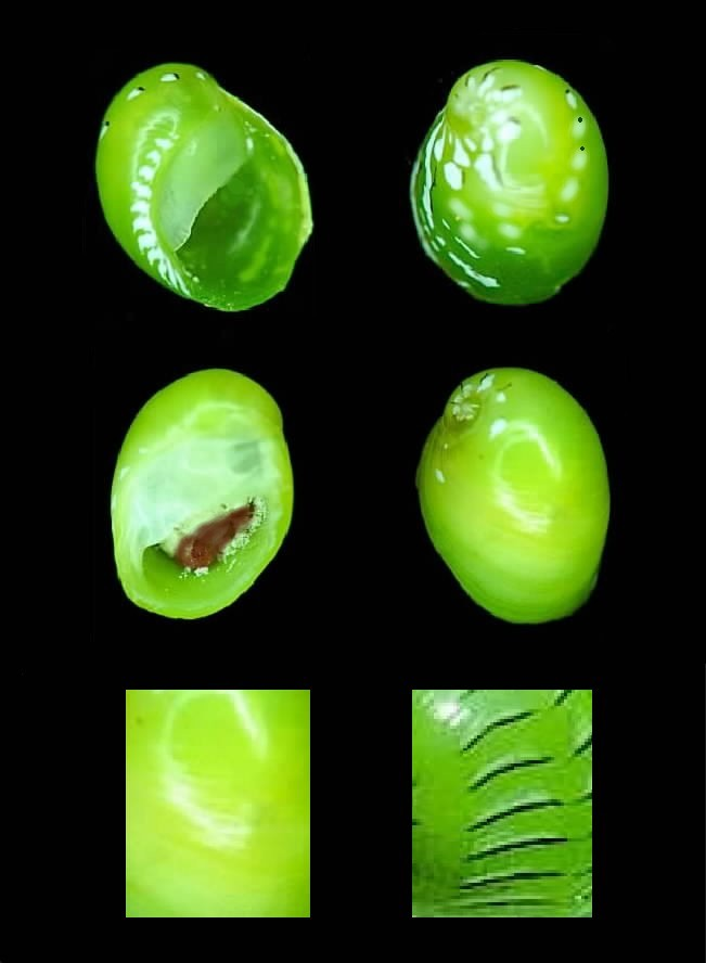 Smaragdia viridis de La Ciénaga de Ocumare, estado Aragua - Venezuela.